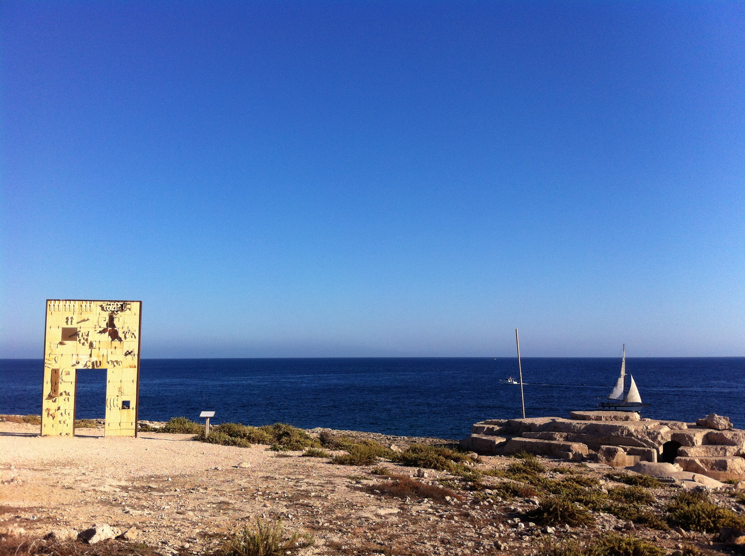 "Porta di Lampedusa - Porta d'Europa"Un monumento per i migranti deceduti e dispersi in mare di Mimmo Paladino.